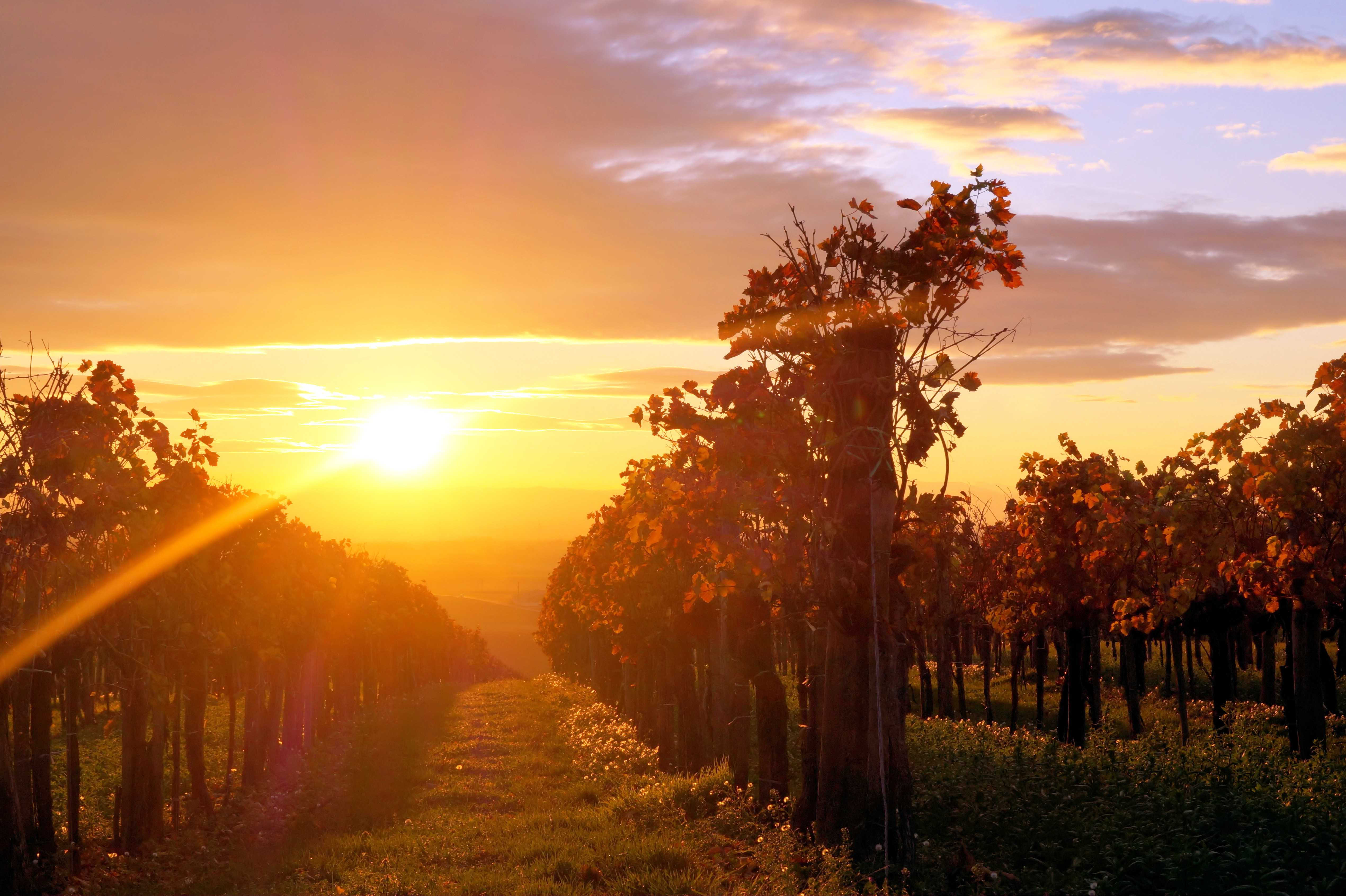 Weingarten - Ruppersthal - Nov.2015